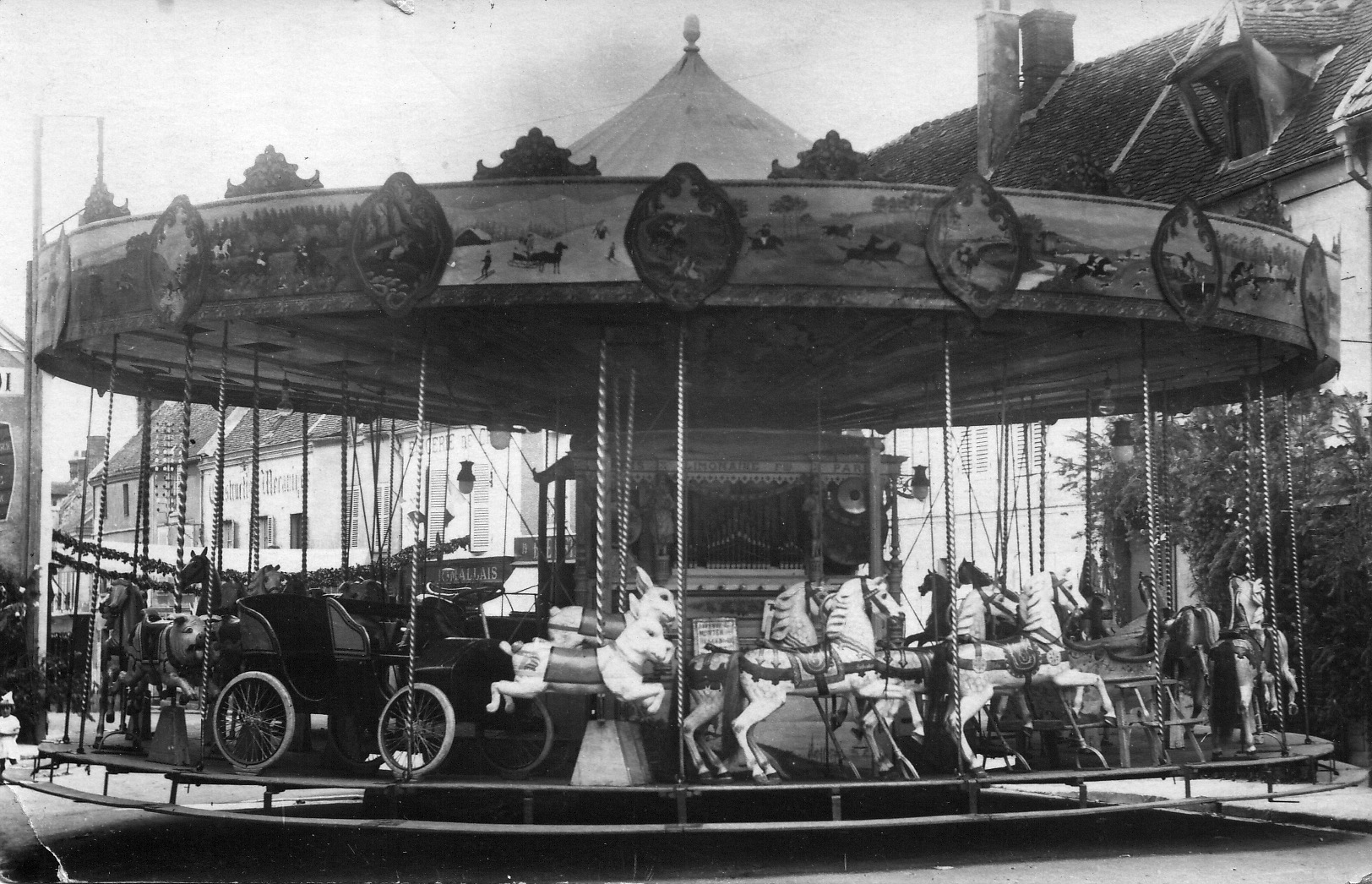 photo d'un carousel début 20e siècle